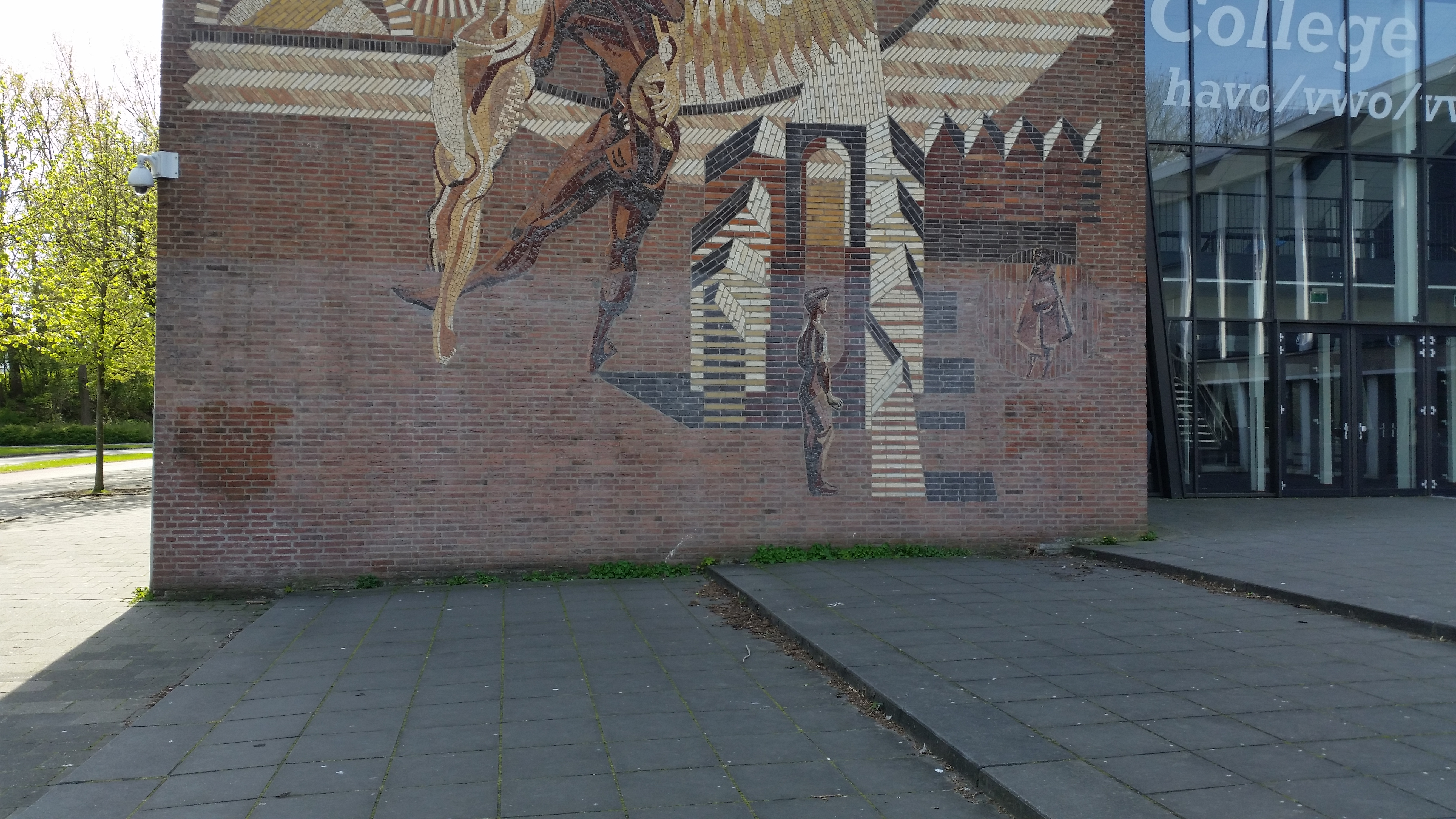 impressie van Jacobs gevecht met de engel, Nobelweg 4-6 te Amsterdam-Oost